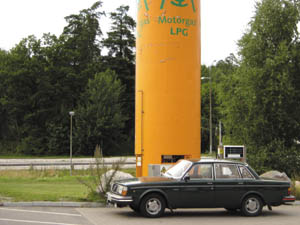 Tanka motorgas på en Preemmack i Nacka